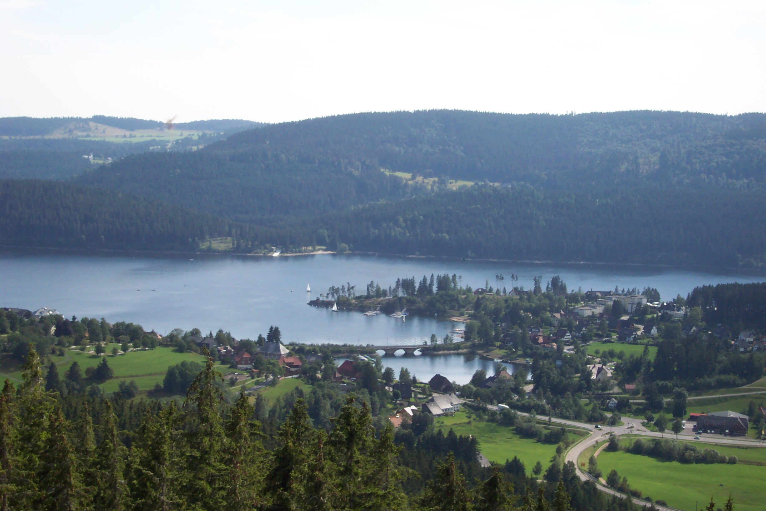 Blick von dem Aussichtsturm auf dem Riesenbühl nach Schluchsee mit Bahnbrücke.